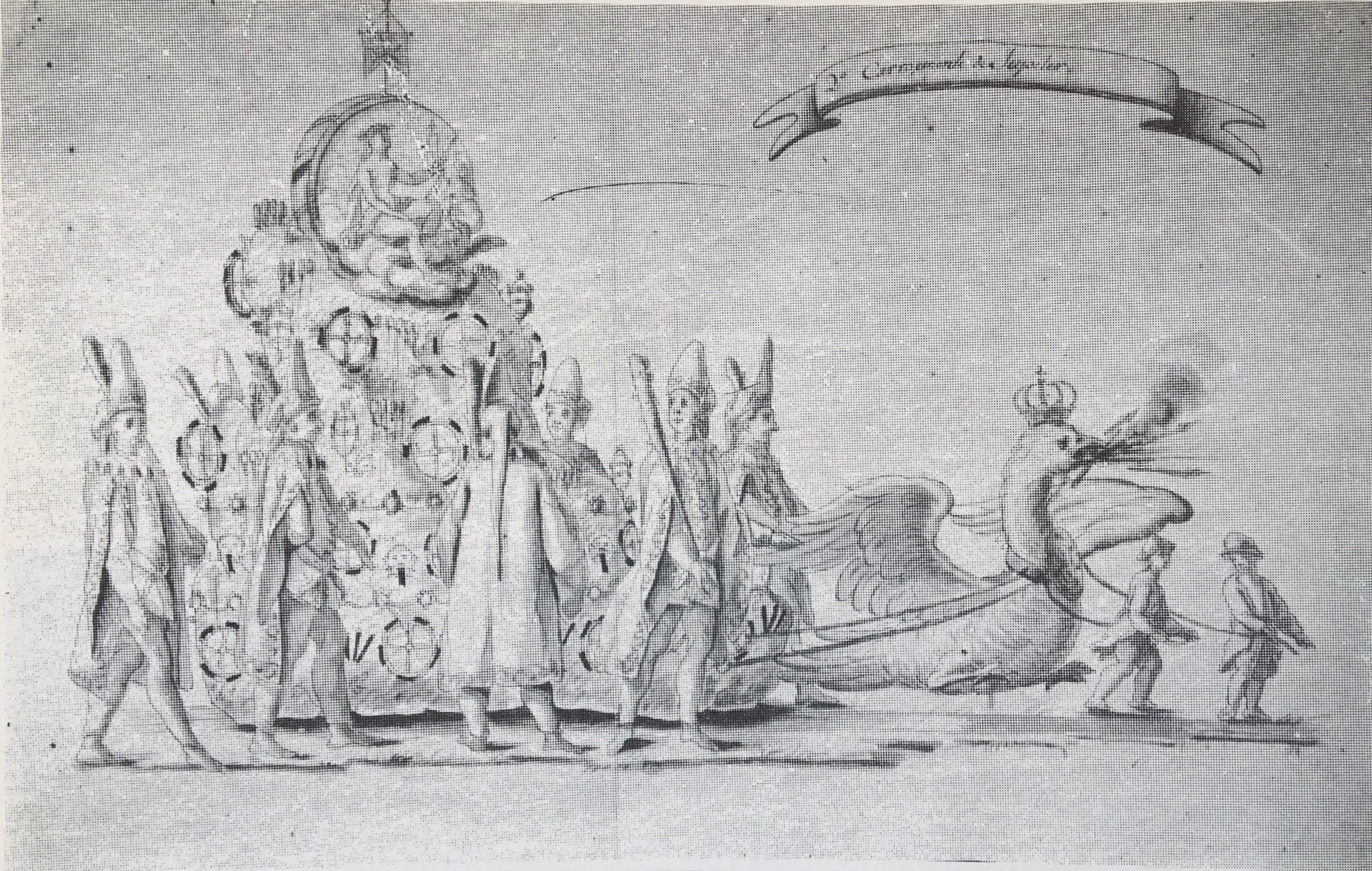 Desenho do carro alegórico "de Júpiter" de Antônio Francisco Soares de 1786 para as festividades locais comemorativas do casamento dos Infantes de Portugal.